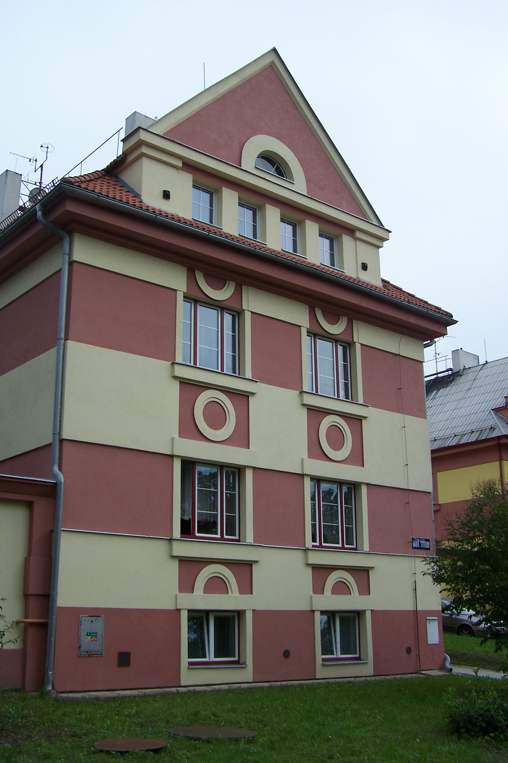 Oldřich Liska: Městský činžovní dům v rondokubistickém slohu na nábřeží Svobody.